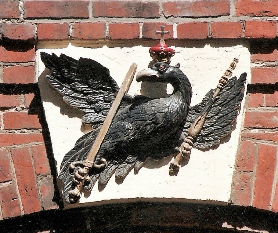 Friederizianische fliegende schwarze Adler mit Zepter und Schwert am Hermbergschen Haus